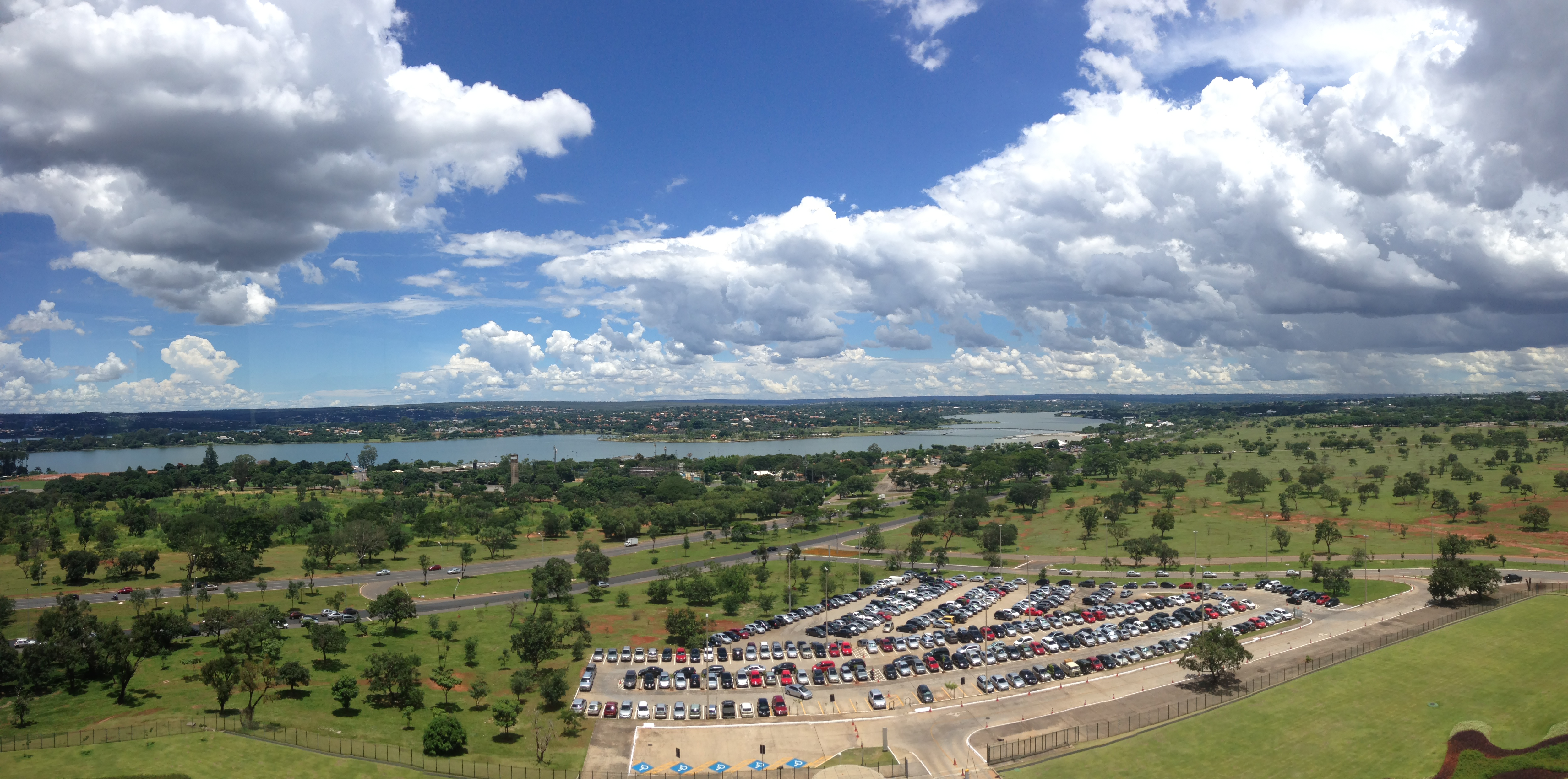 Lago Paranoá na cidade de Brasília, Distrito Federal. Visão a partir do edifício sede do Tribunal Superior do Trabalho.